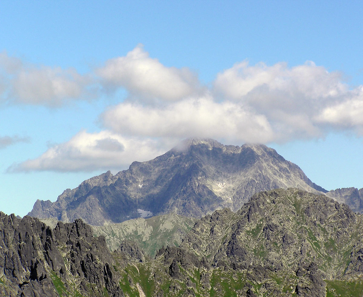 Lodowy Szczyt widziany z zachodu, z odległego Mnicha. Wierzchołki Lodowego i Lodowej Kopy nieco schowane w chmurze. Na pierwszym planie (na dole zdjęcia), od lewej grań od Żabiego Niżniego, Owcza Przełęcz, Owcze Turniczki, Marusarzowa Turnia i zielone siodło Białczańskiej Przełęczy Na drugim planie nieco po prawej wierzchołek Młynarza Jestem autorem zdjęcia - Andrzej Makarczuk.